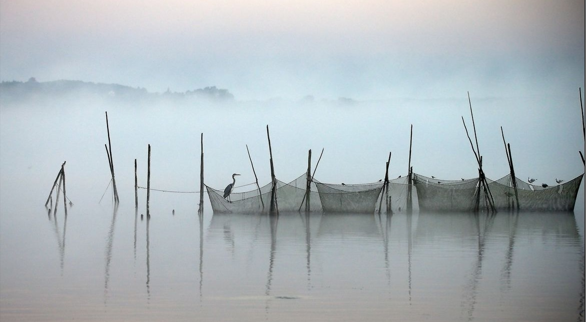 Reuse mit Graureiher im Malchiner See